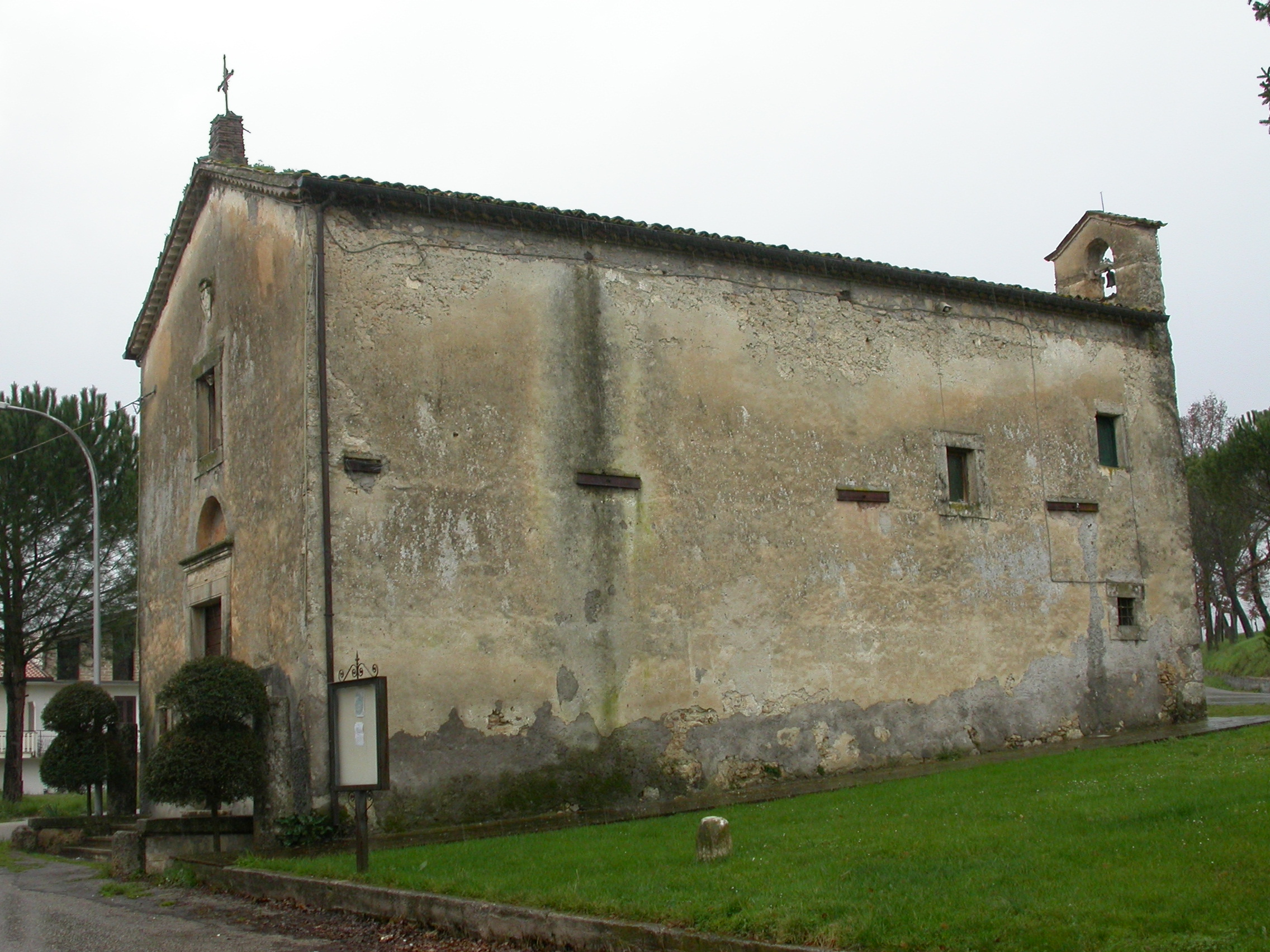 Veduta esterna della chiesa di Canneto a Colli